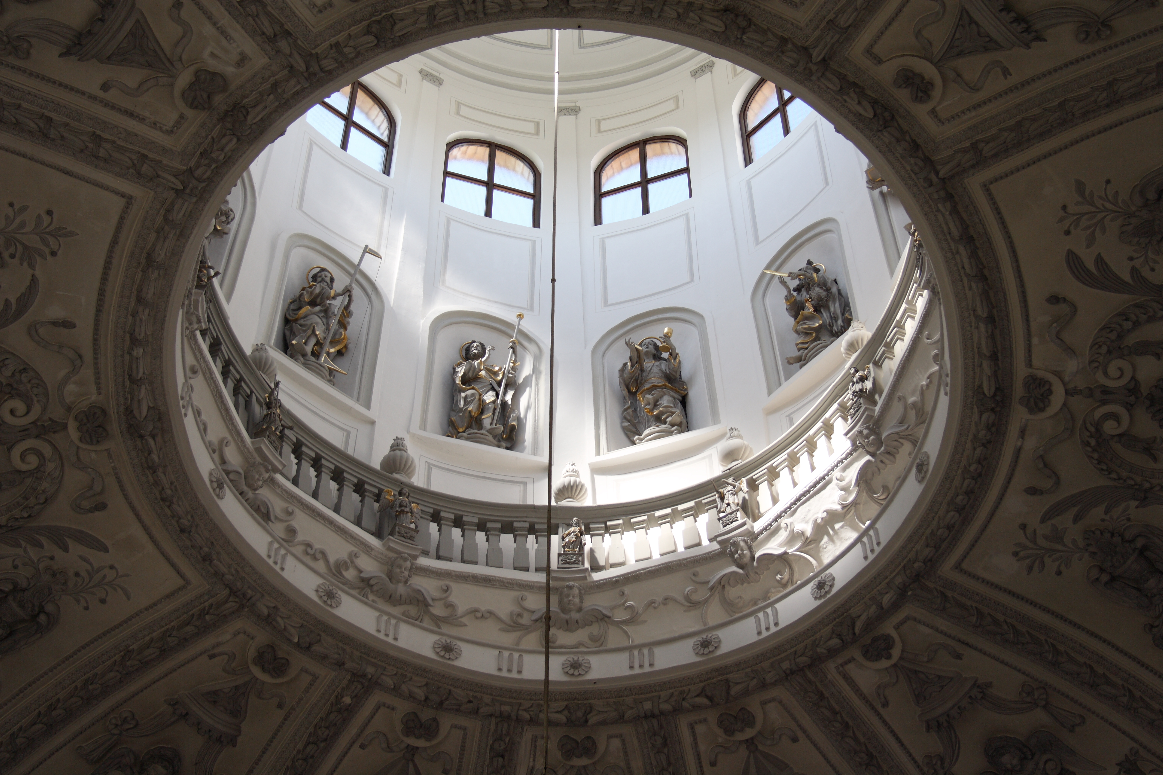 Wallfahrtskirche Maria Birnbaum in Sielenbach im Landkreis Aichach-Friedberg (Bayern), Kuppel mit Apostelfiguren